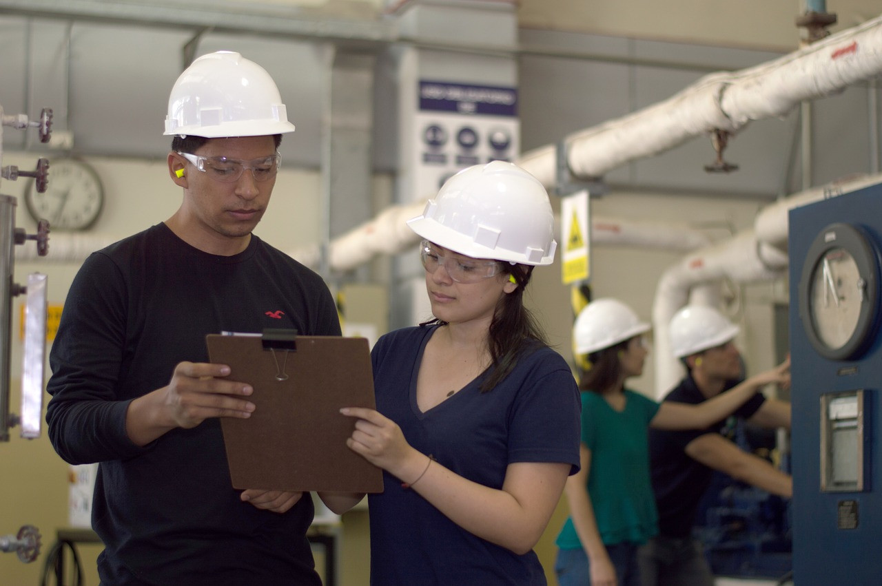 Los ingenieros industriales pueden desarrollarse en diferentes areas de la industria desde administracion o recursos humanos, hasta producción y calidad.